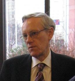 Judge Heikki Kanninen